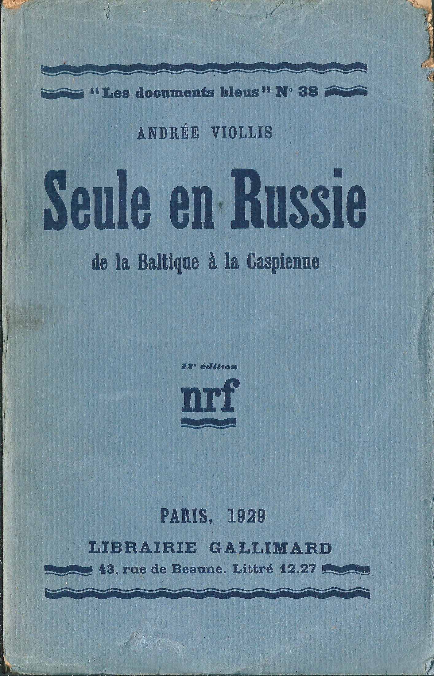 Couverture de Seule en Russie, par Andrée Viollis, année 1929